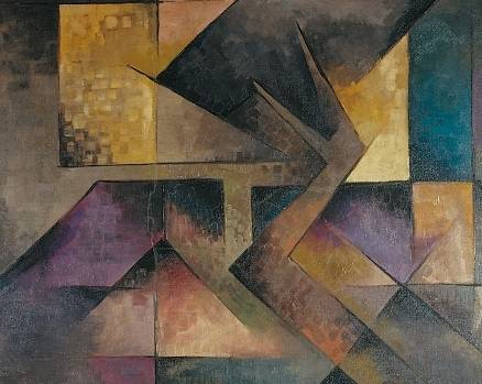 Autoportret VII